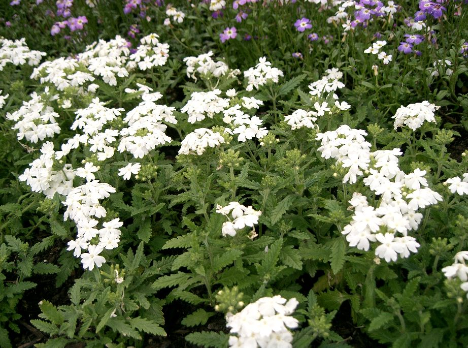 Verbena 'Obssesion White'